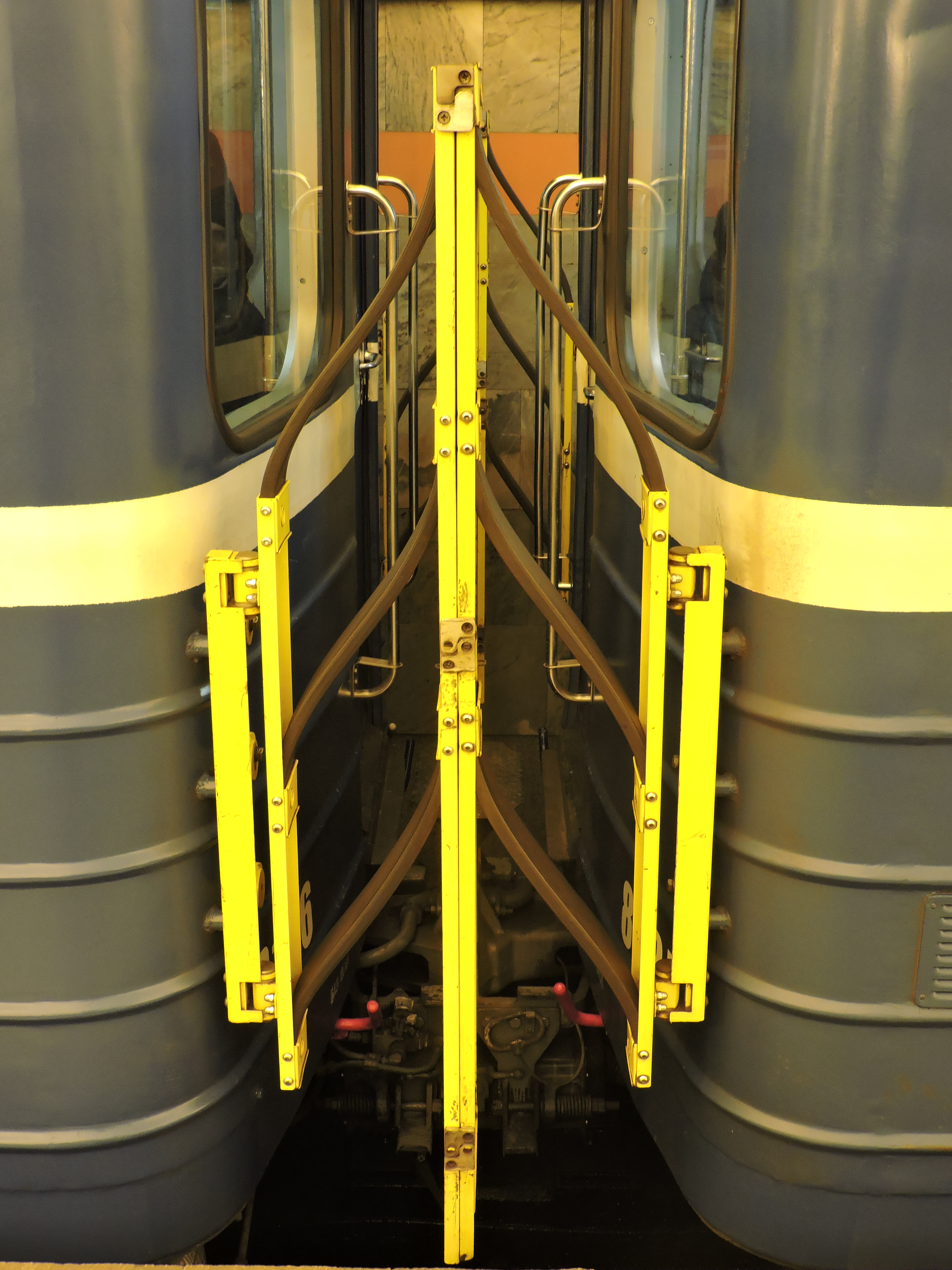 Ограждения между вагонами электропоезда метро 81-717/714 для предотвращения падения пассажиров с платформы, а также для помехи зацеперам, которые хотят прокатиться в межвагонье